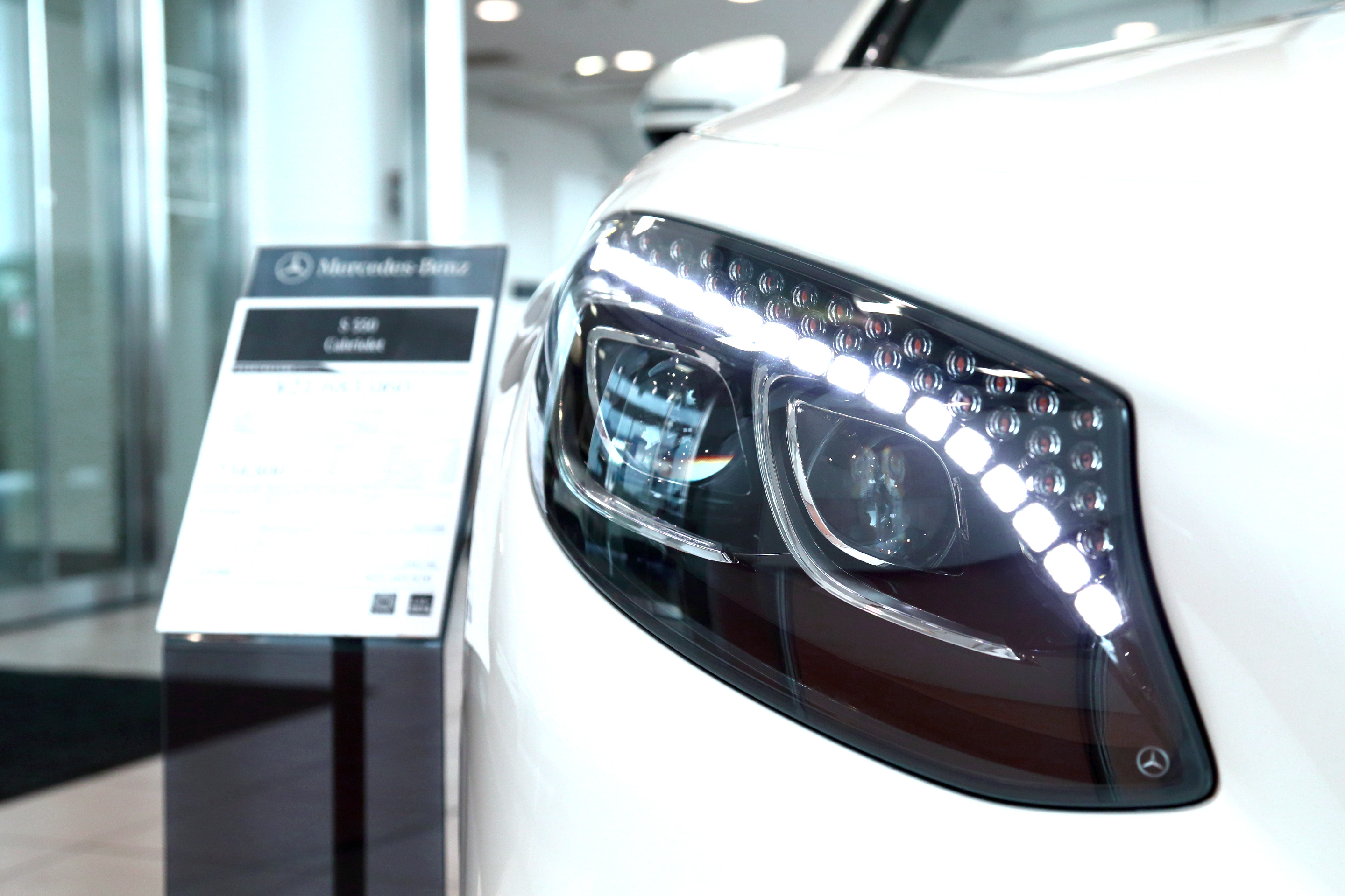 C217型Sクラスカブリオレ（S550）のスワロフスキーをあしらった前照灯